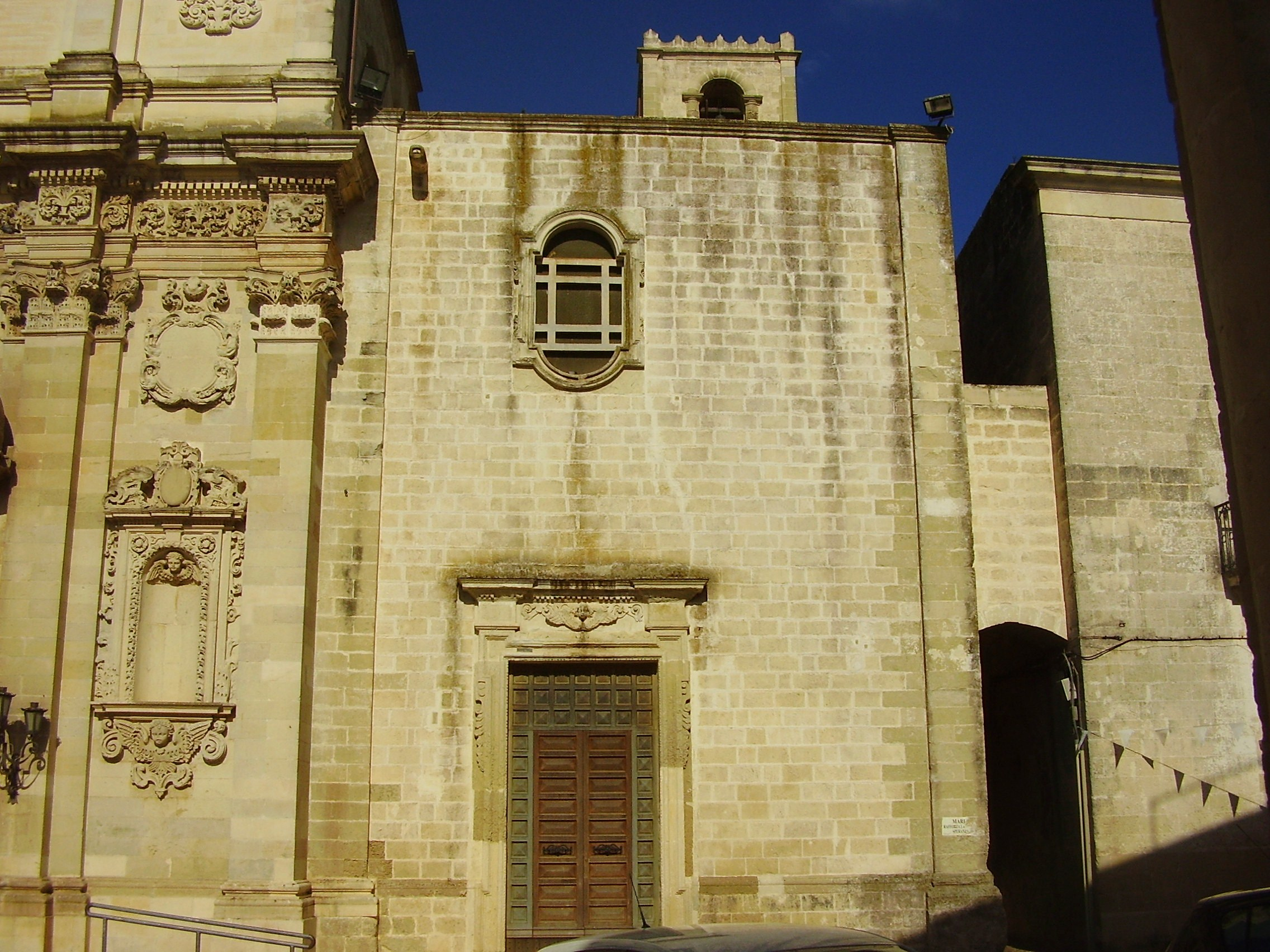 Chiesa Immacolata Poggiardo